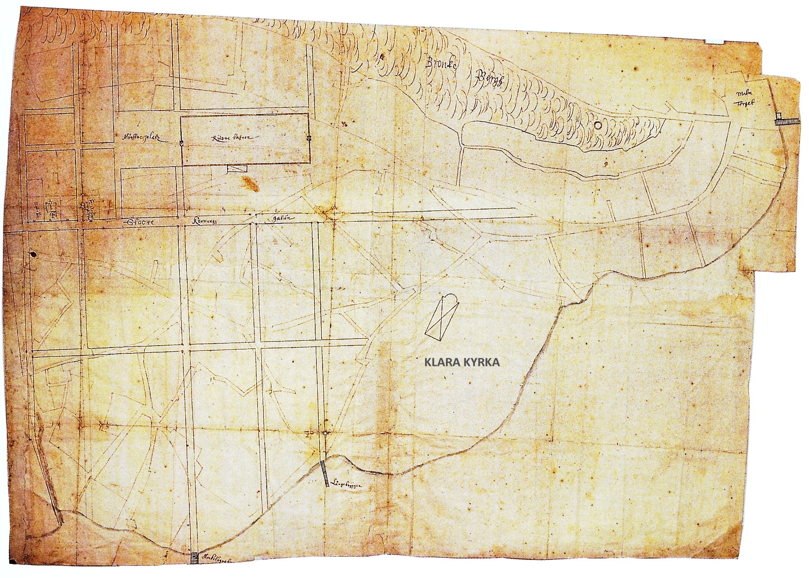 Norrmalms västra del, Stockholms första gatureglering på "Norra Förstaden", lagd över det medeltida gatunätet. Kartan är illa medfaren och hade antagligen äanvänds som arbetsritning på fältet, norr är till vänster